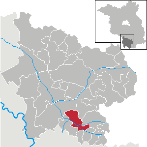 Elsterwerda in Brandenburg (Country) - District Elbe-Elster